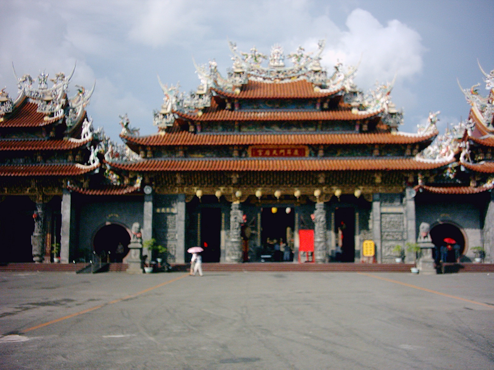 鹿耳門天后宮。